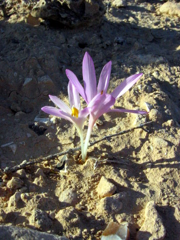 Colchicum tunicatum סתוונית הקליפות